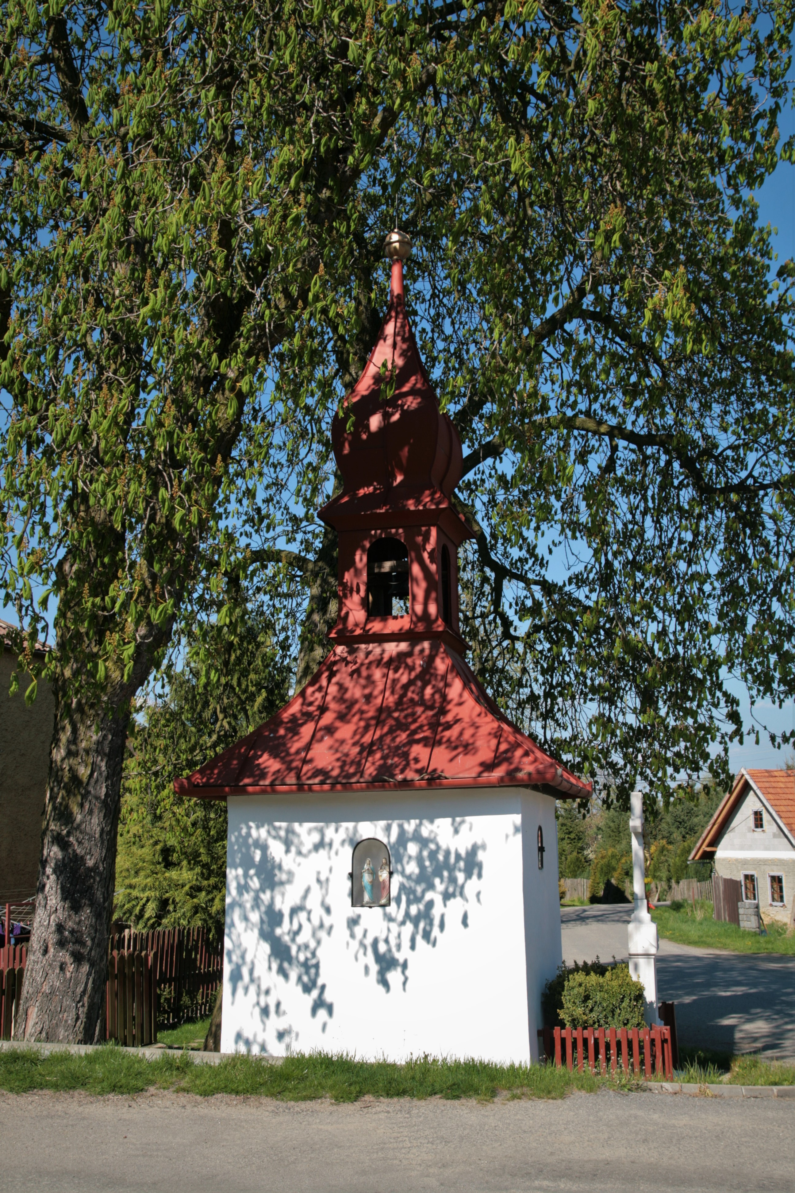 Obec Radňoves v okrese Žďár nad Sázavou. Kaple na návsi s křížem.